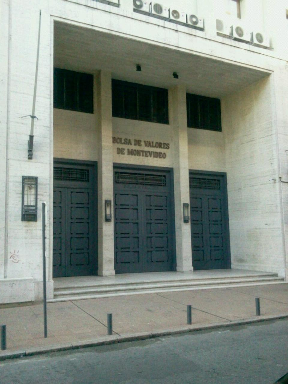 Fachada del edificio de la Bolsa de Valores de Montevideo, Misiones 1400, Montevideo, Uruguay